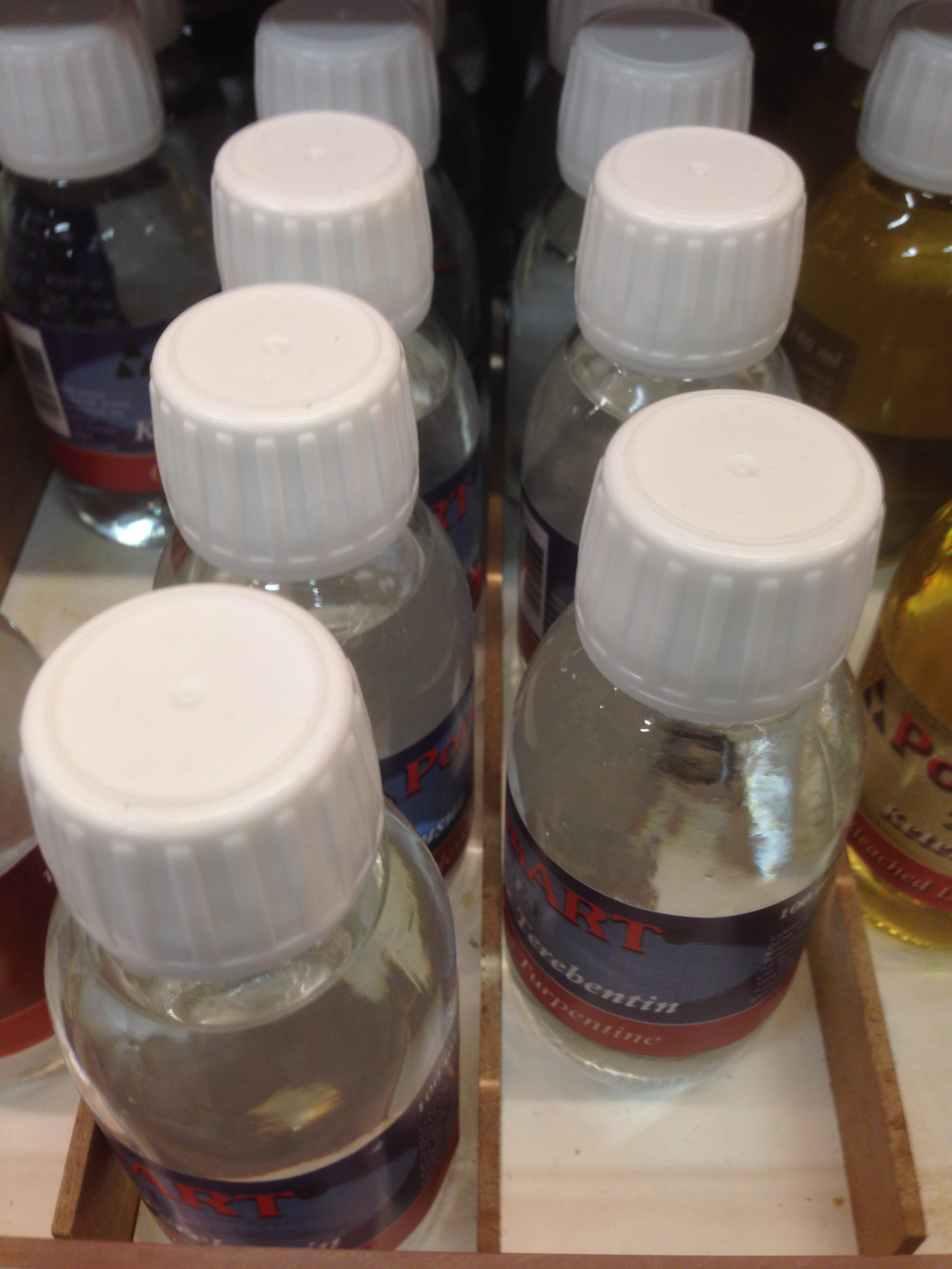 çeşitli resim malzemeleri